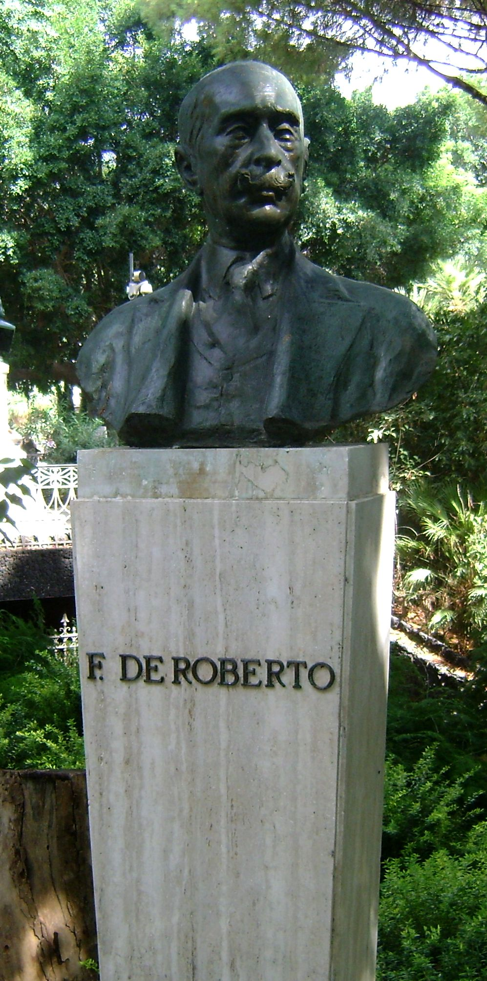 Federico De Roberto - Giardino Bellini - settembre 2010